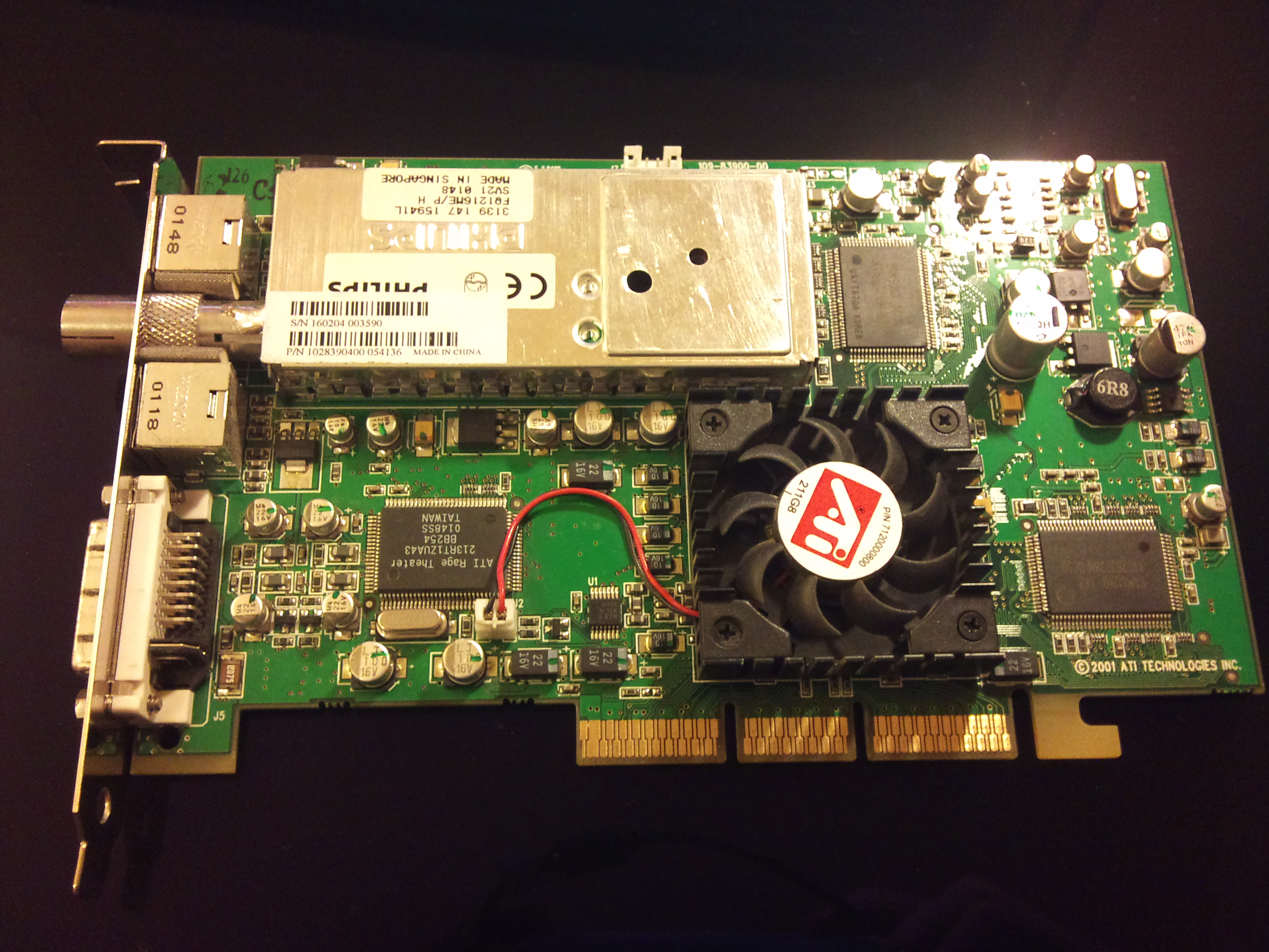 Carte graphique ATi Radeon 7500 All-in-Wonder 64Mo